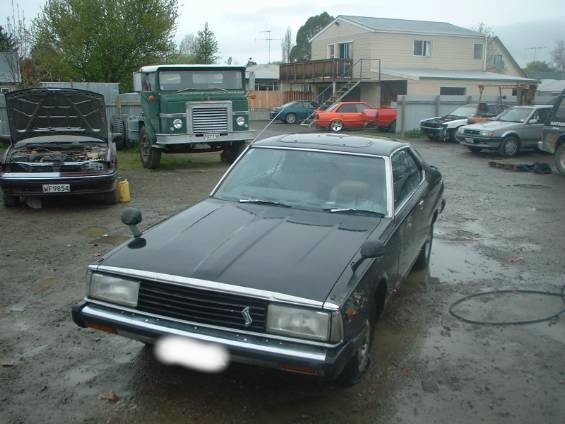 1981 Nissan Skyline